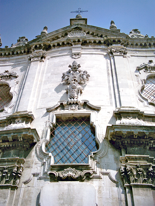 San Severo, particolare della facciata di San Lorenzo delle Benedettine (sec. XVIII). Il file è stato creato da Tobia Gorrio.